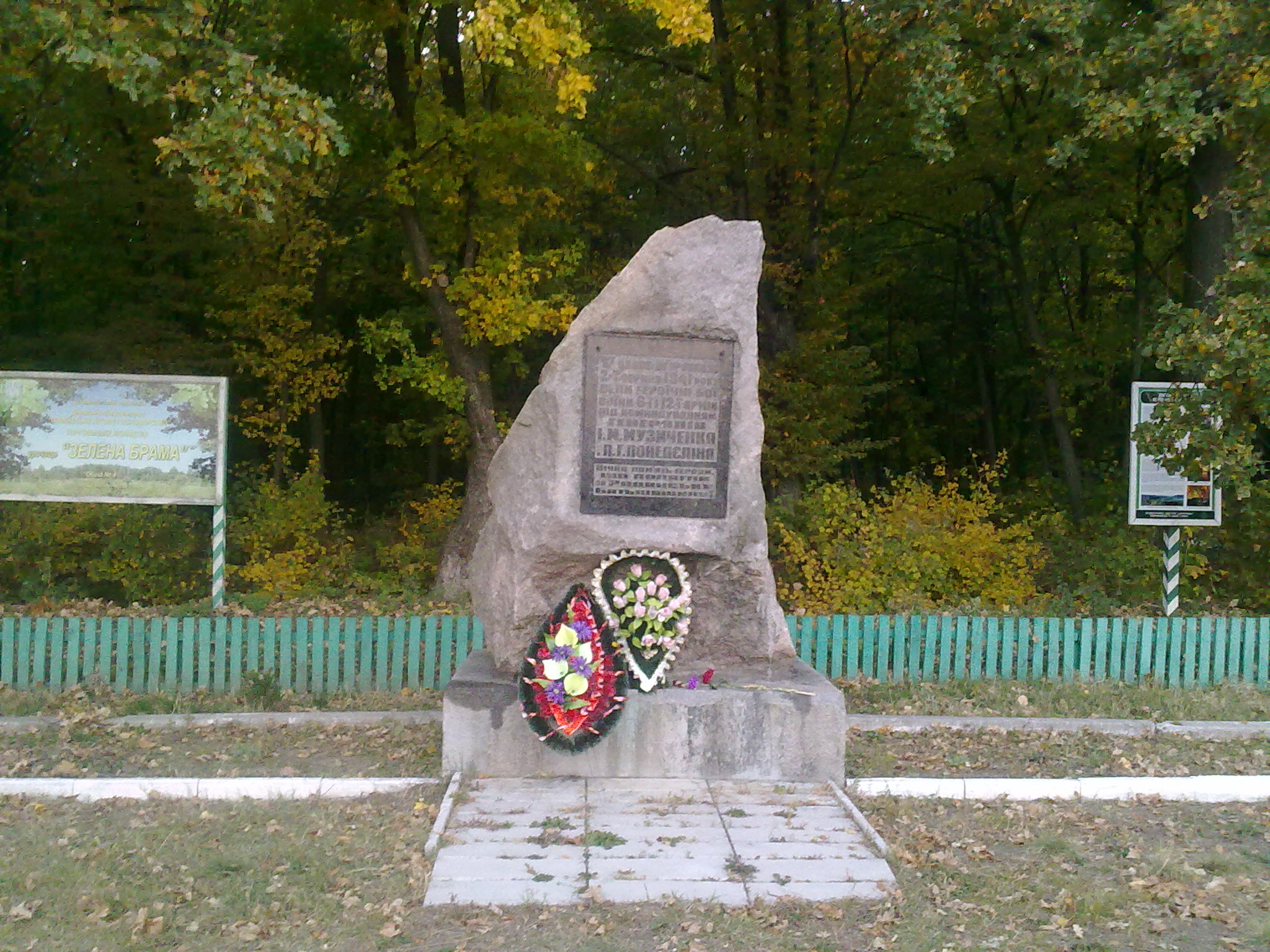 Пам'ятний знак на честь 6-ї та 12-ї армії, Новоархангельський район, С.Під-високе Під-висоцька с/рада, урочище «Зелена Брама»